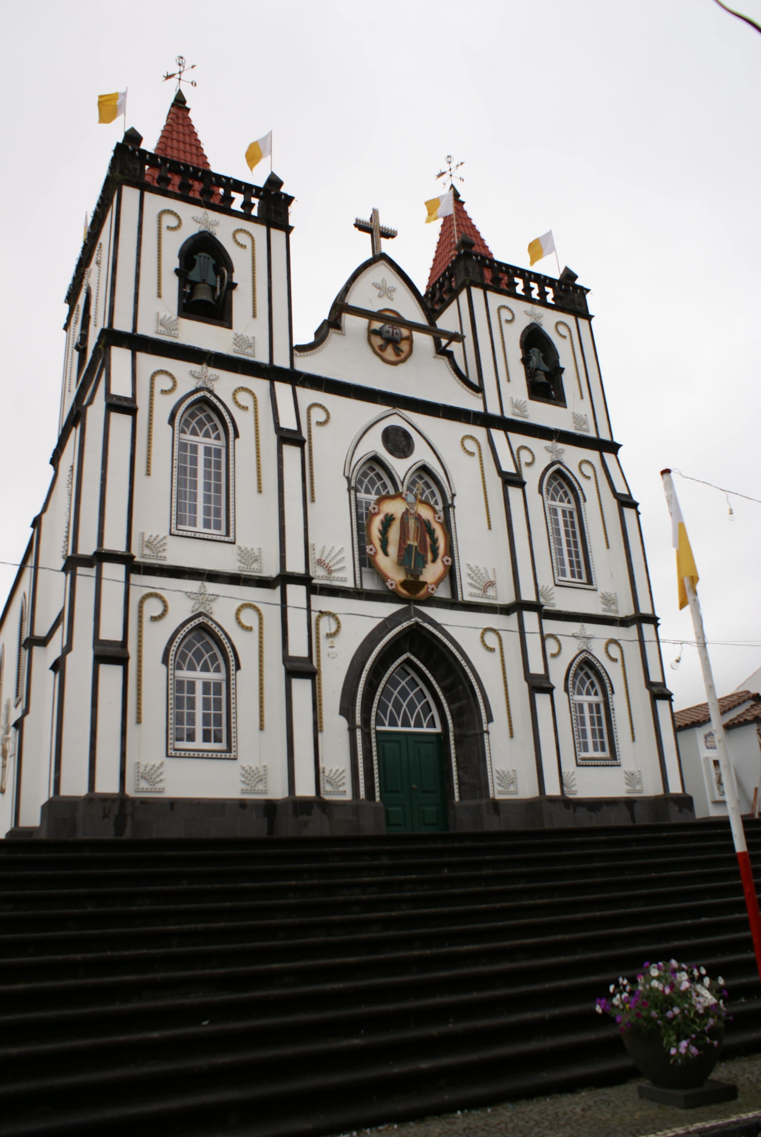 Igreja de São Brás, São Brás, Ribeira Grande, ilha de São Miguel, Açores